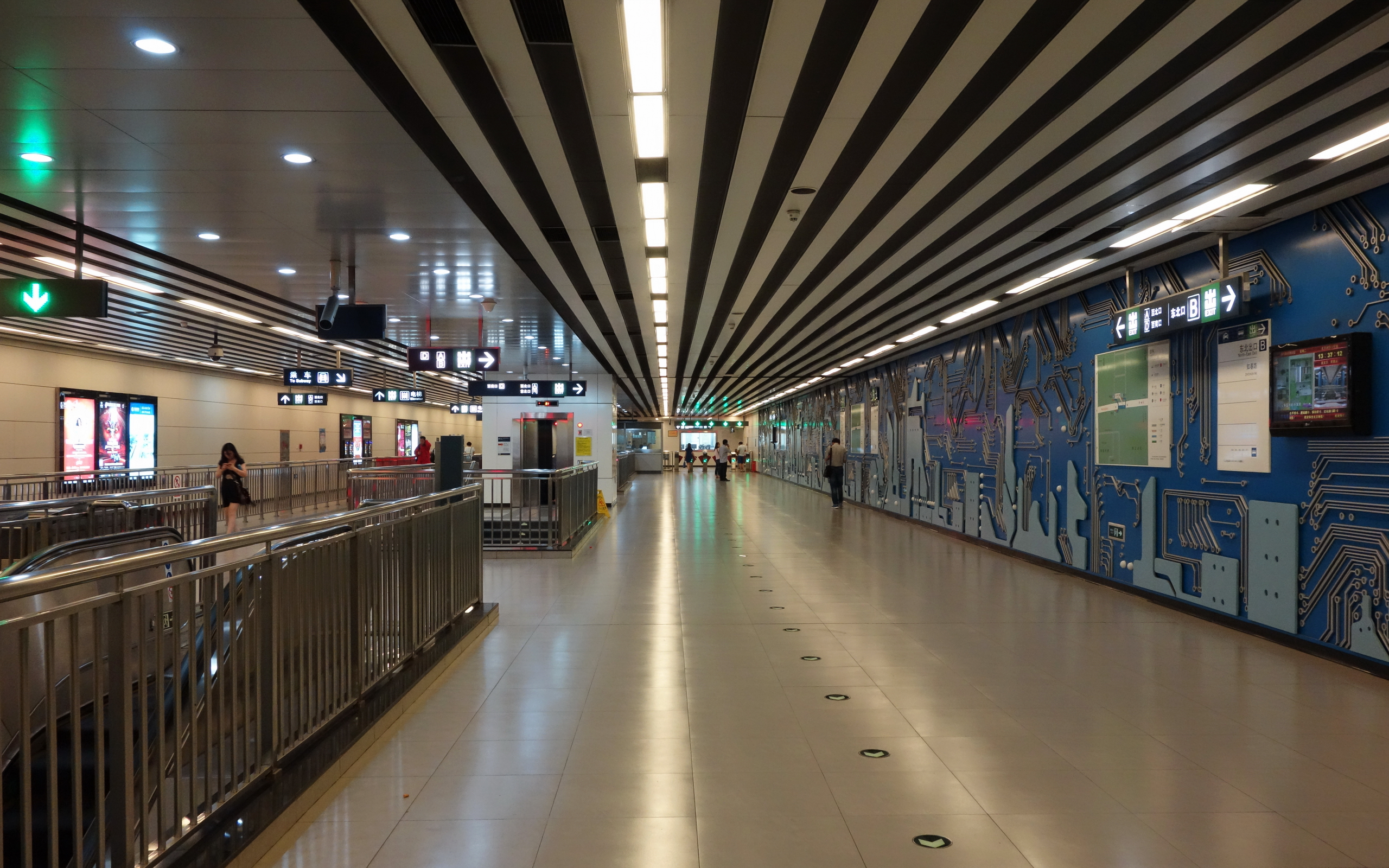 知春里站无柱整体式站厅